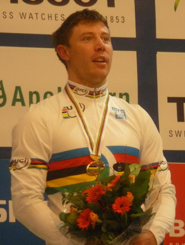 Shane Perkins, australischer Radrennfahrer